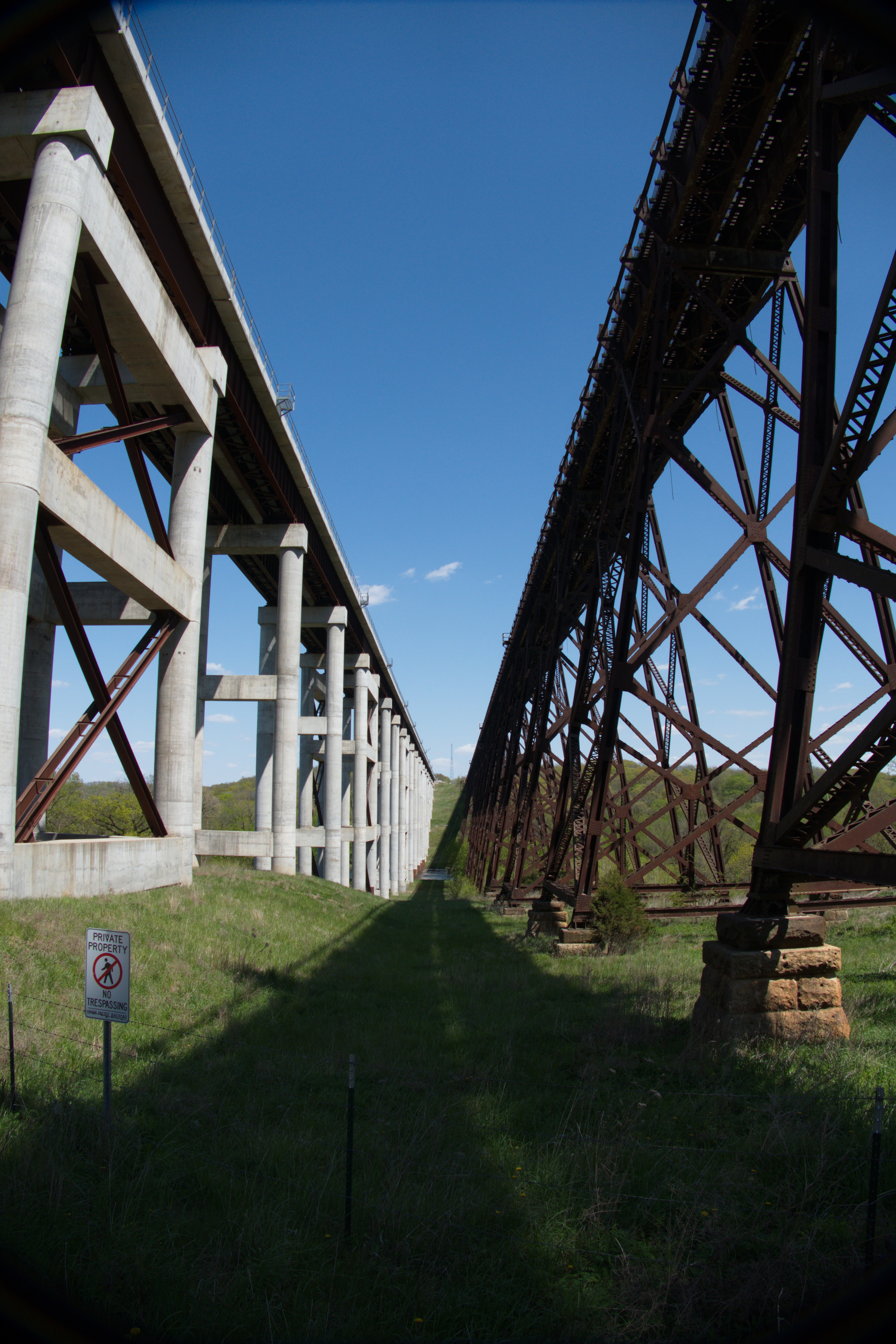 Cate-Shelley-Highbridge, Iowa